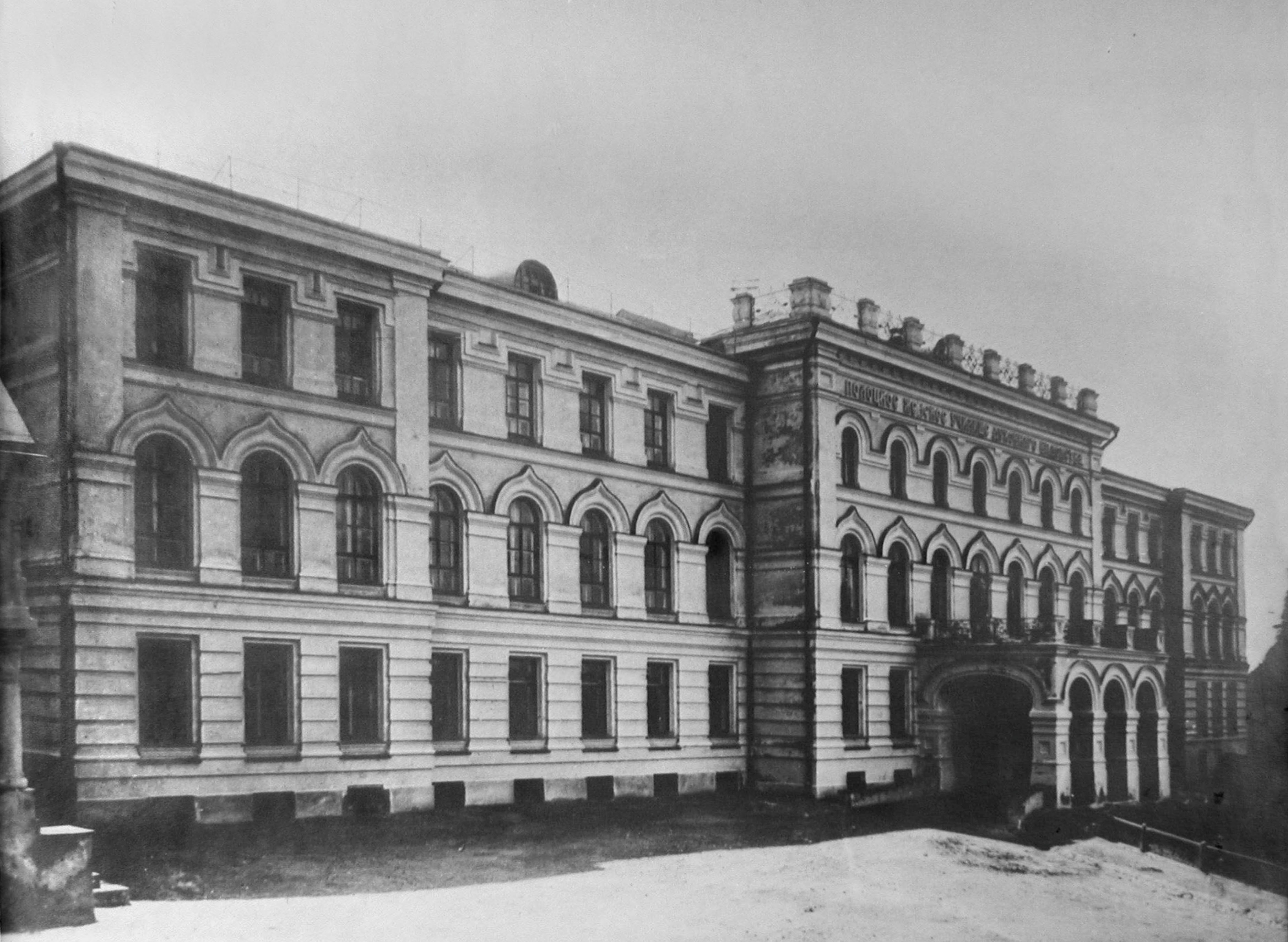 Беларуская (тарашкевіца): Віцебск (Viciebsk), Духаўская гара (Duchaŭskaja hara)